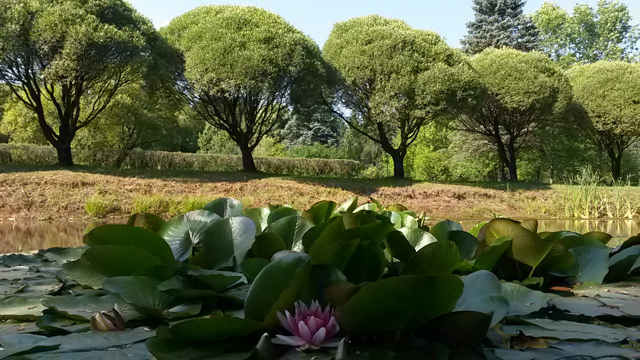 Алея вербаў шарападобных, лотасы